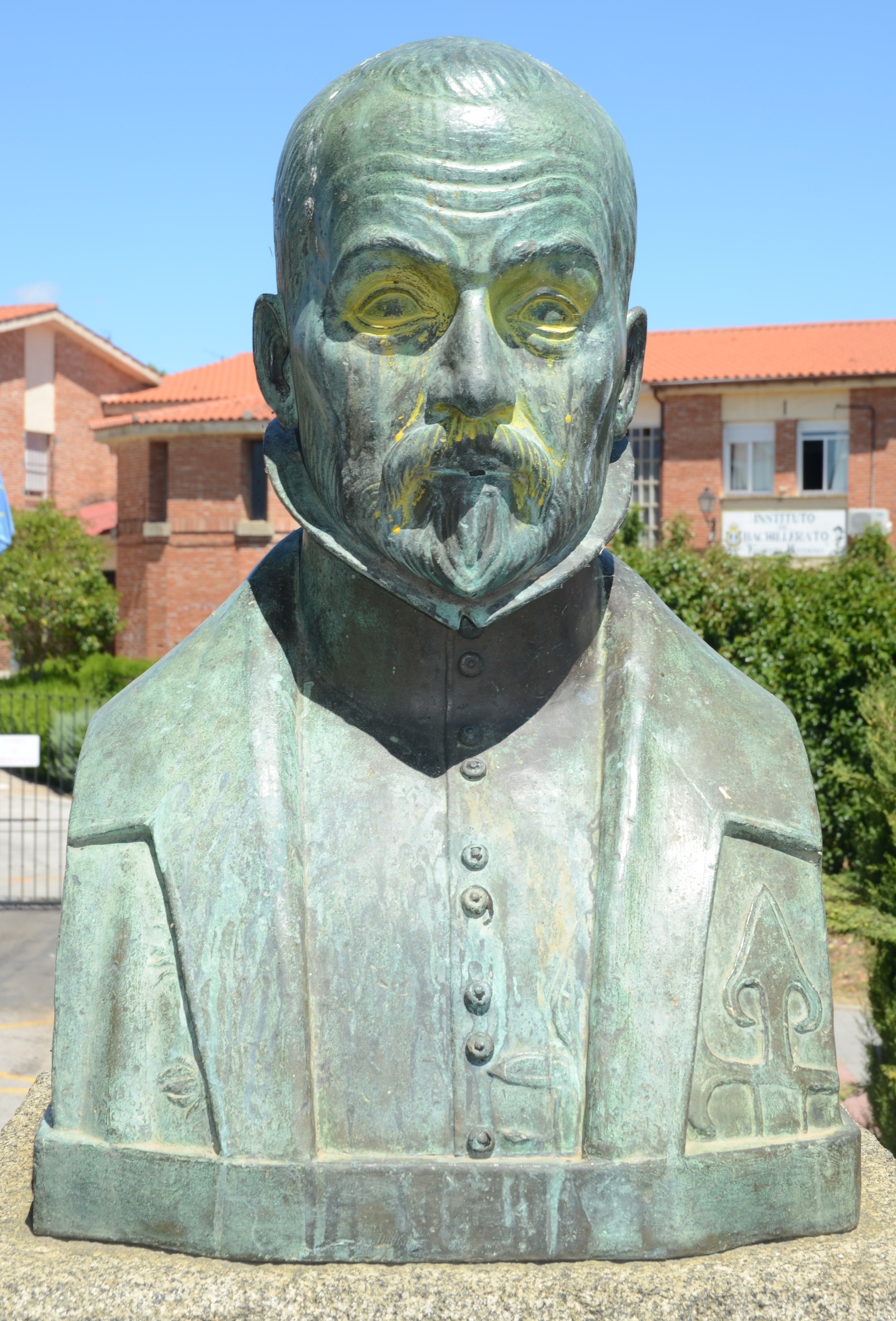 Vista frontal del busto de bronce de Benito Arias Montano realizado por el pintor español Eugenio Hermoso (1927) situado en la actualidad en la Avda. de España de Fregenal de la Sierra (Badajoz).